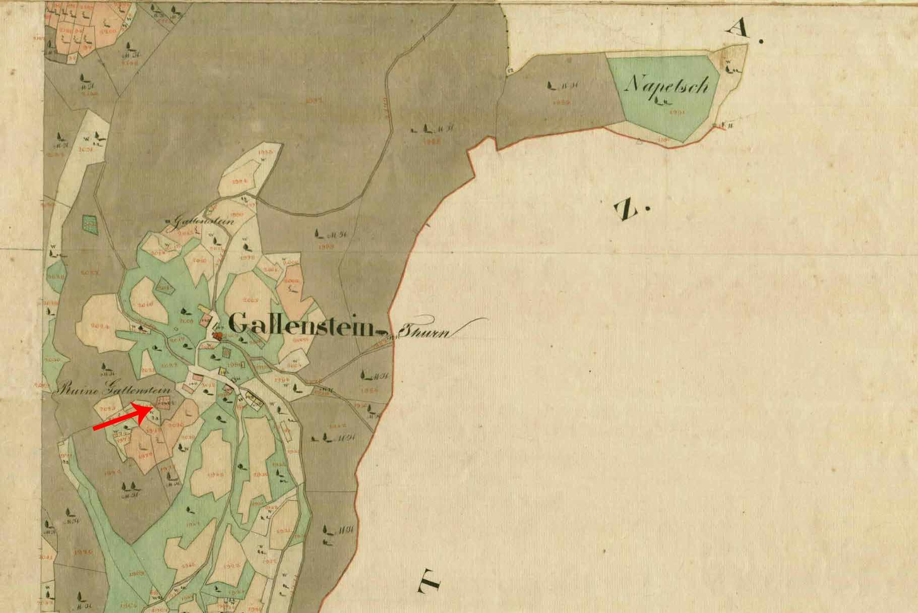 Franciscejski kataster za Kranjsko, 1823-1869